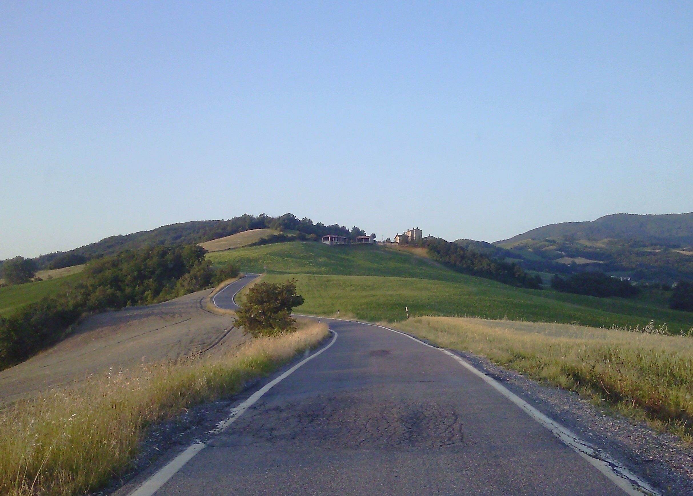 Verso Lardera